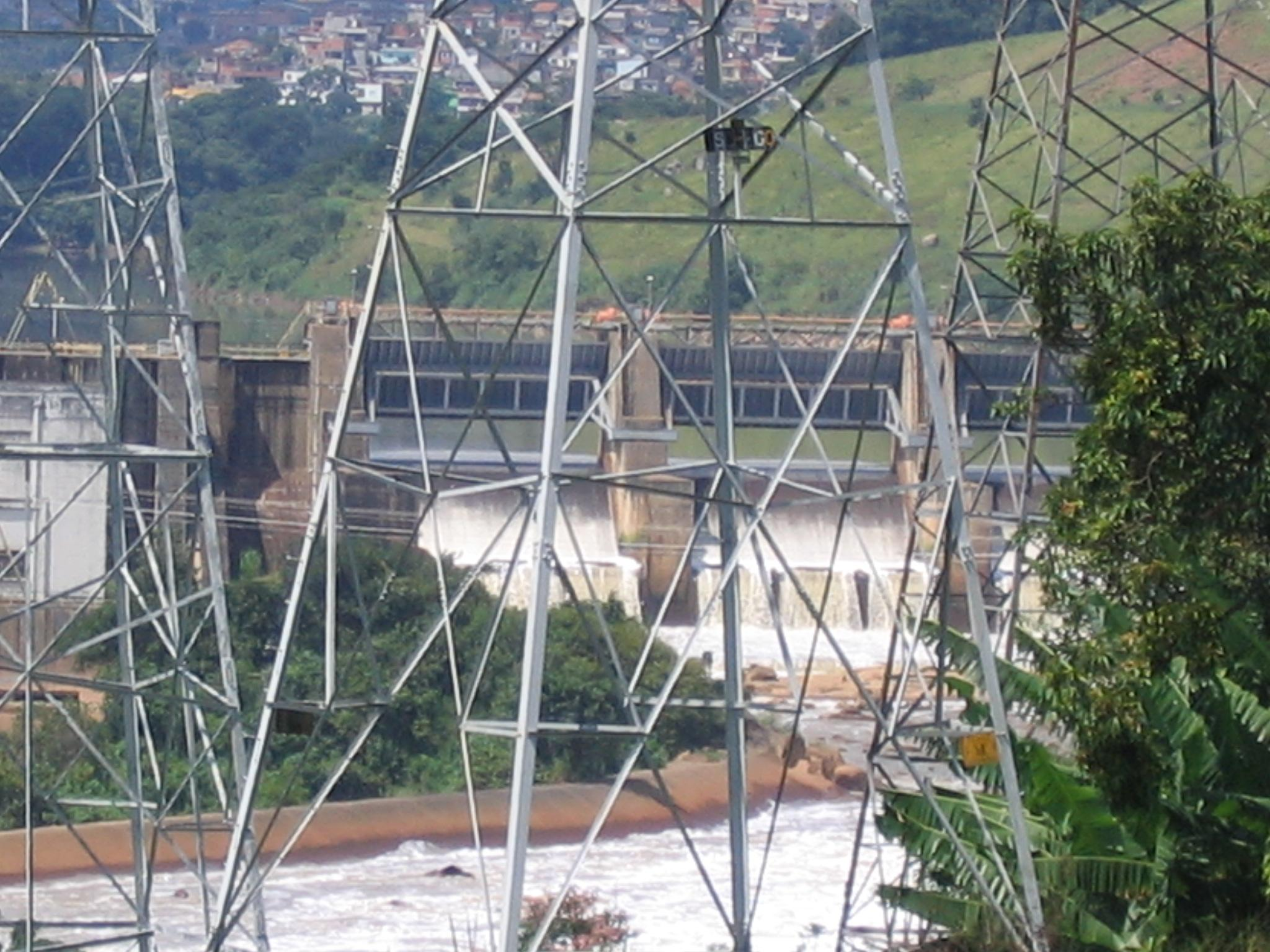 Vertedouros da barragem Edgard de Sousa